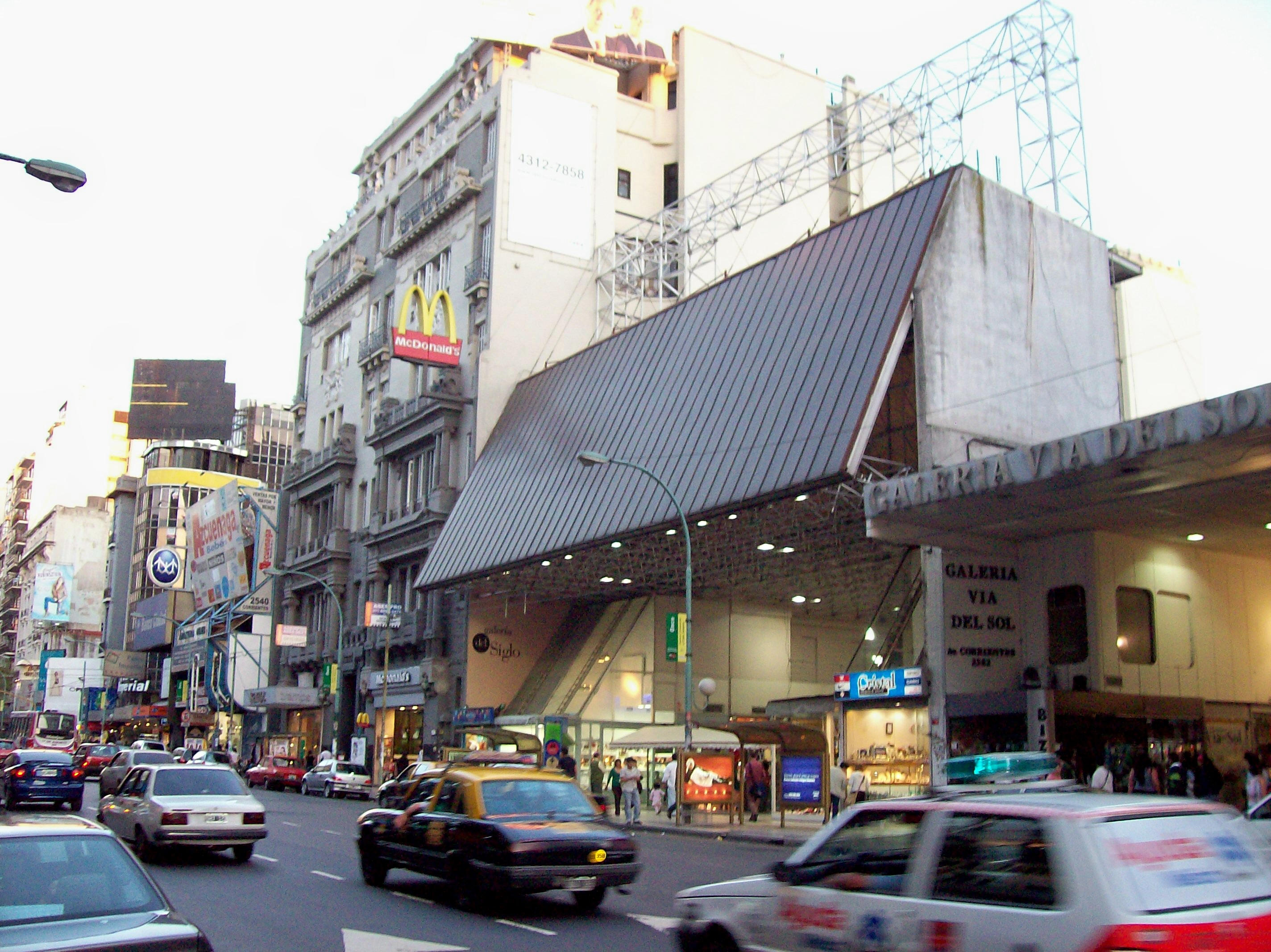 Avenida Corrientes entre Paso y Larea (Ciudad de Buenos Aires), Barrio de Balvanera